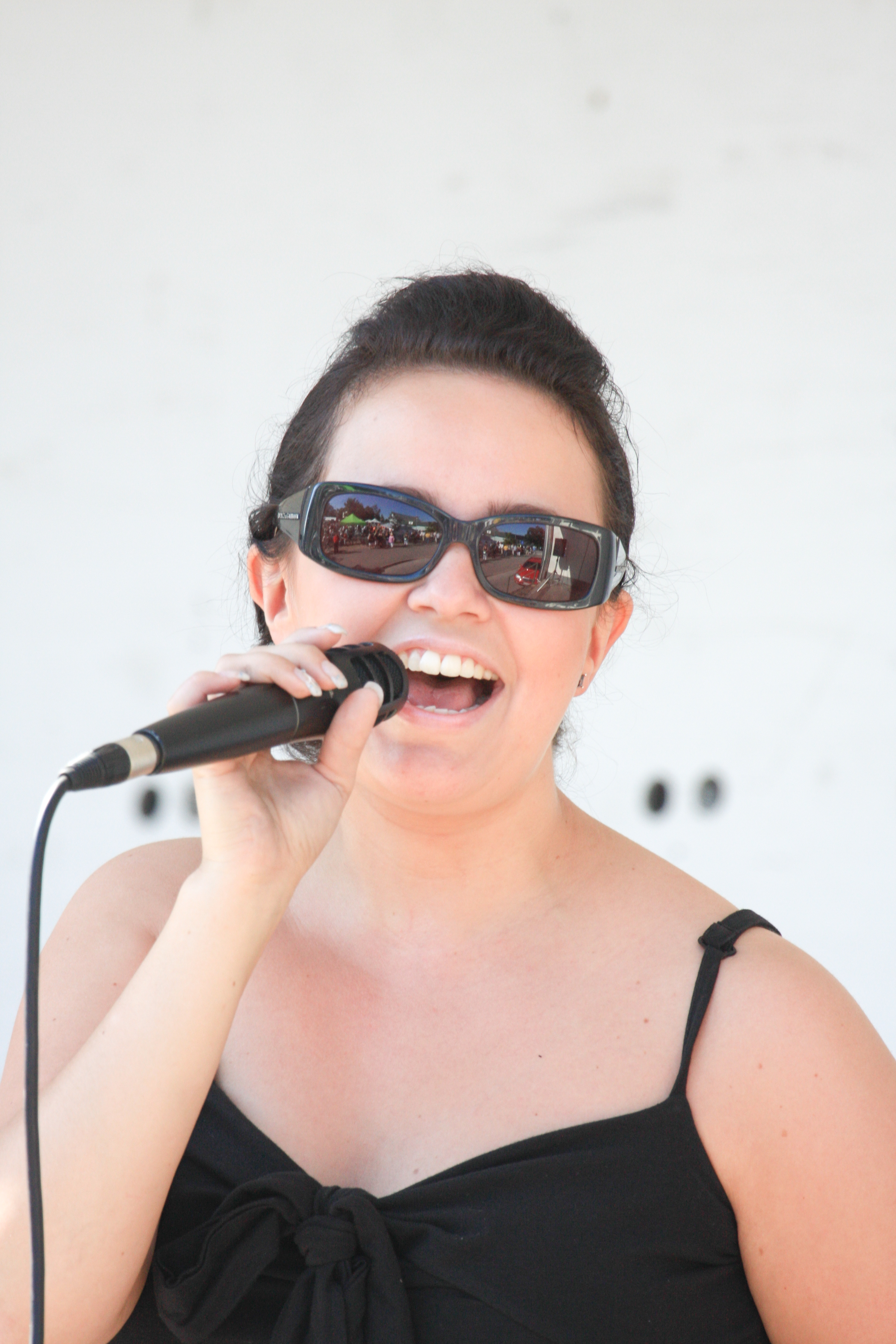 Johanna Debreczeni suomalainen laulaja